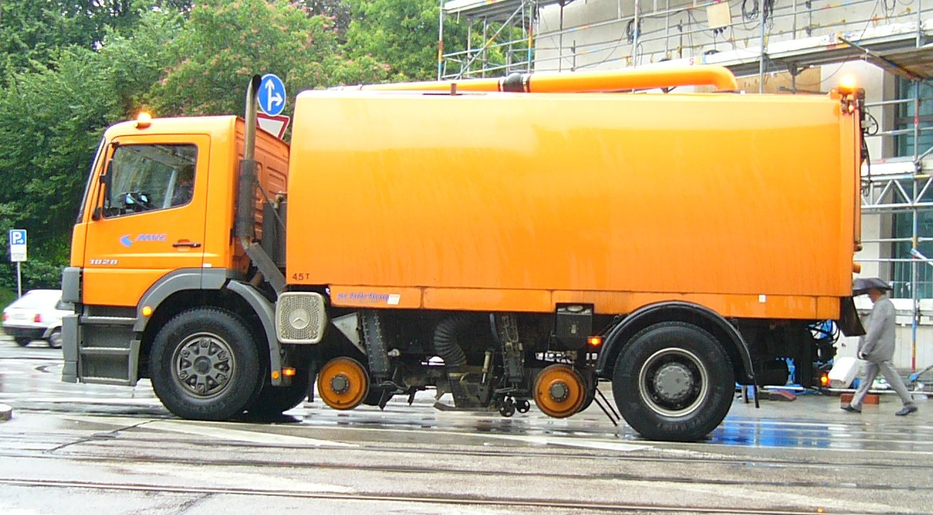 Mercedes-Benz Atego 1828 mit Umbauten durch Schörling-Brock; Schienenreinigungsfahrzeug der Münchner Verkehrsgesellschaft GmbH, Seitenansicht